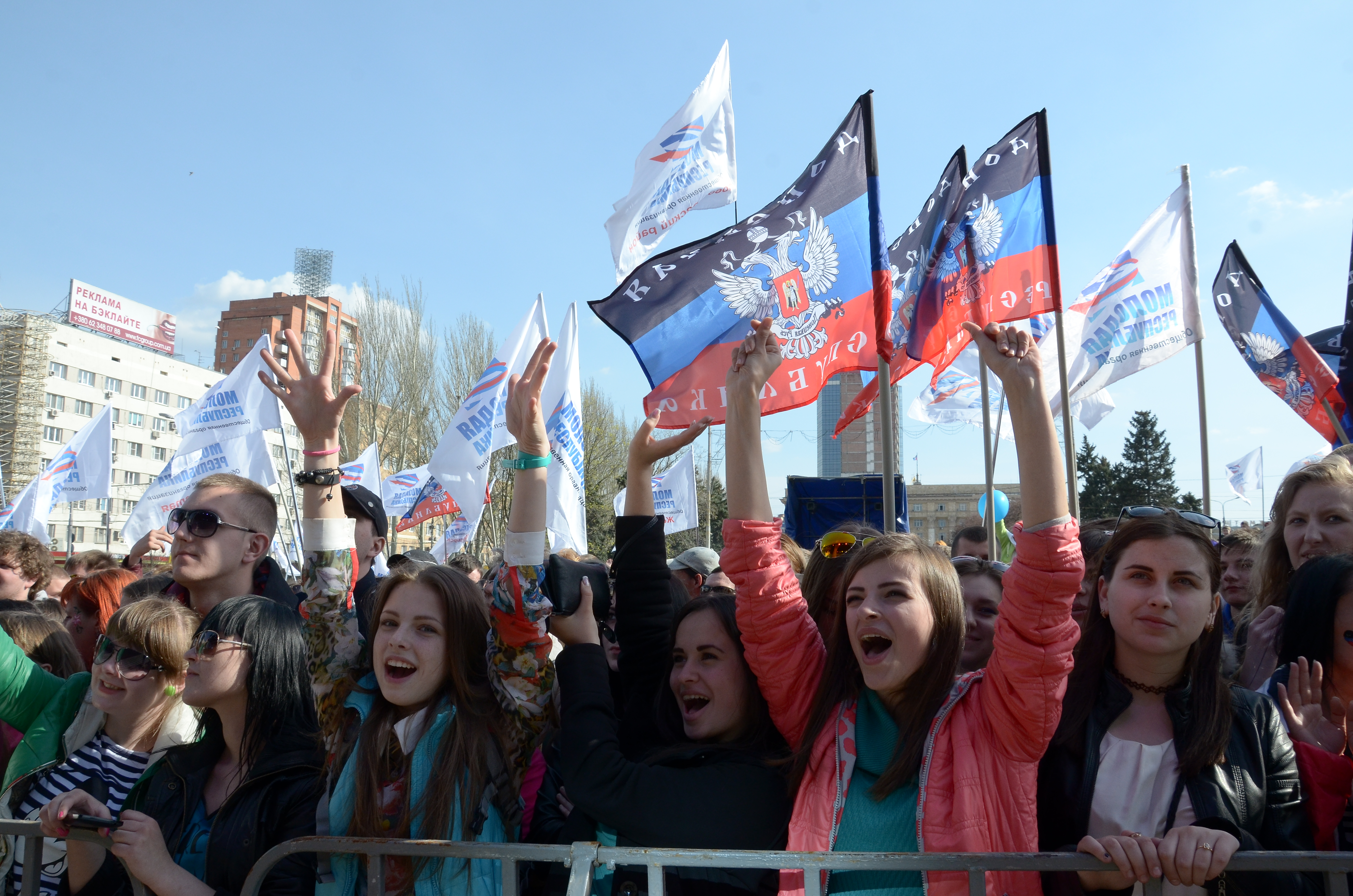 День солидарности молодёжи в Донецке